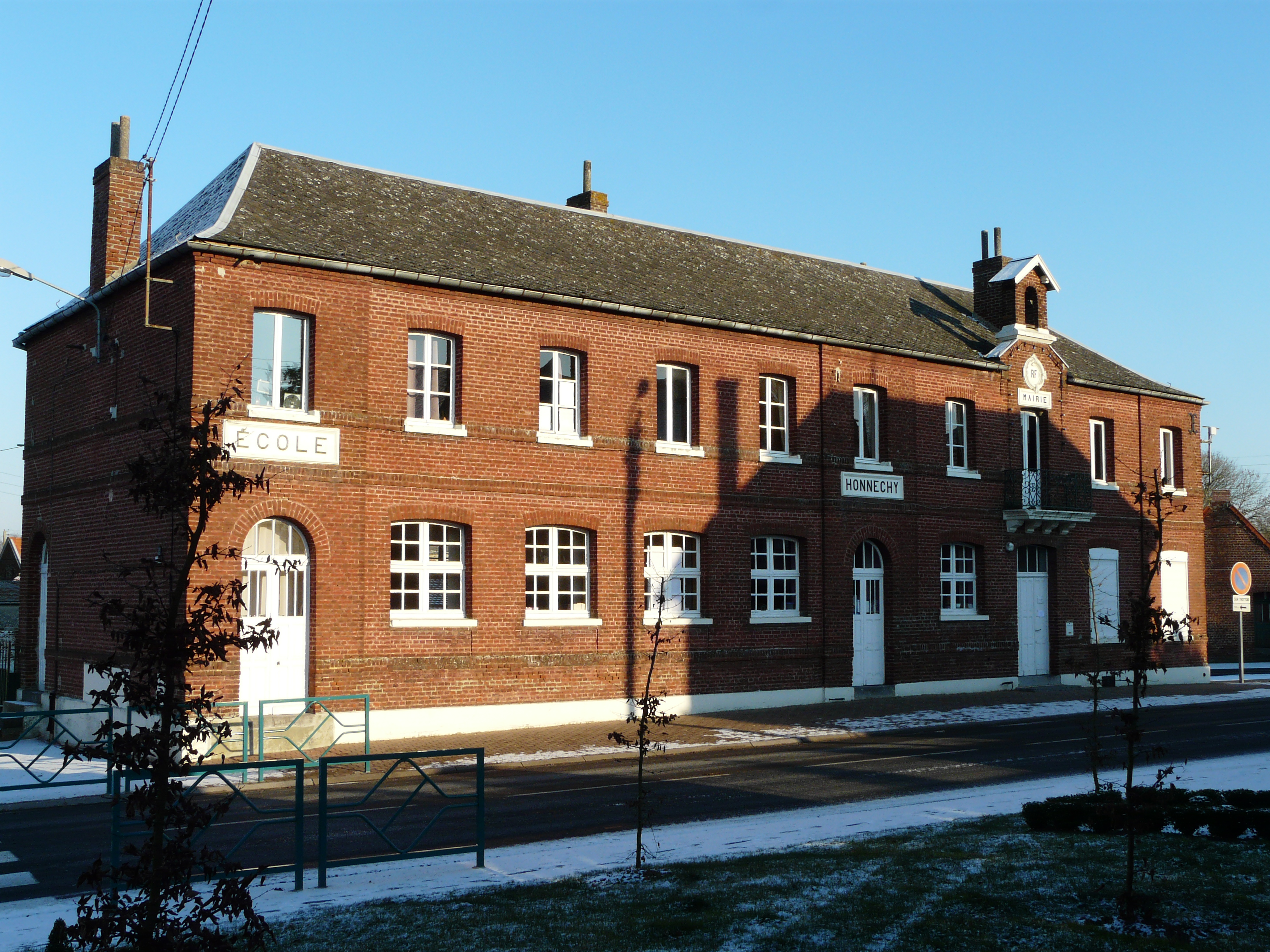 Mairie d'Honnechy (Nord)